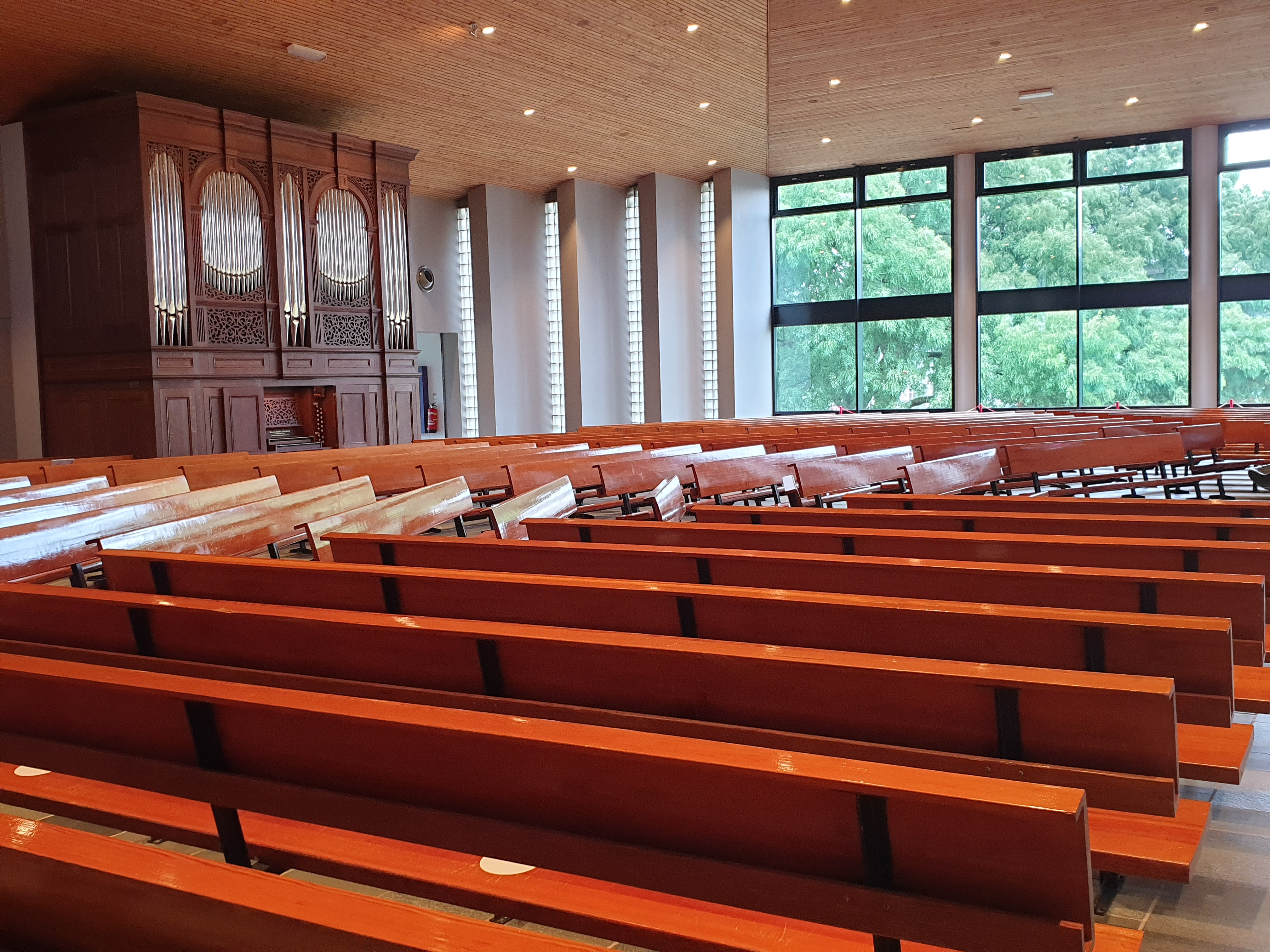 Morgenster Interieur Orgel